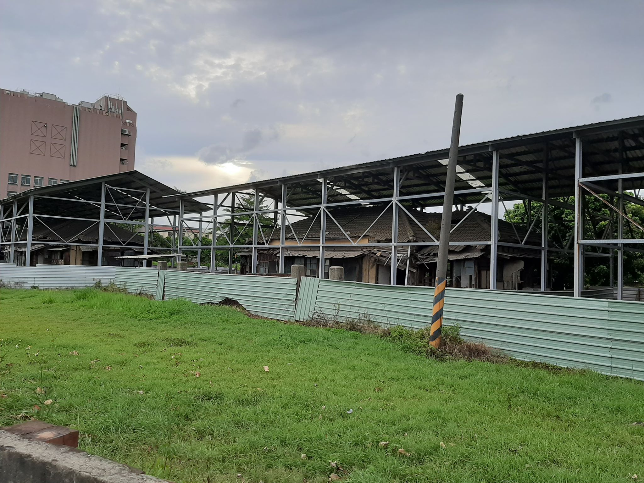 中文（台灣）: 原臺南農校日式宿舍群目前已加蓋鐵皮